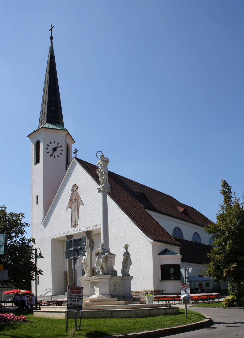 Die Guntramsdorfer Pfarrkirche hl. Jakobus.